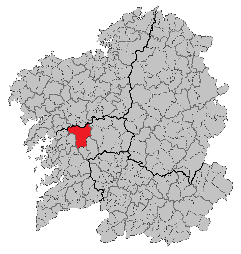 Mapa coa localización do concello de A Estrada.